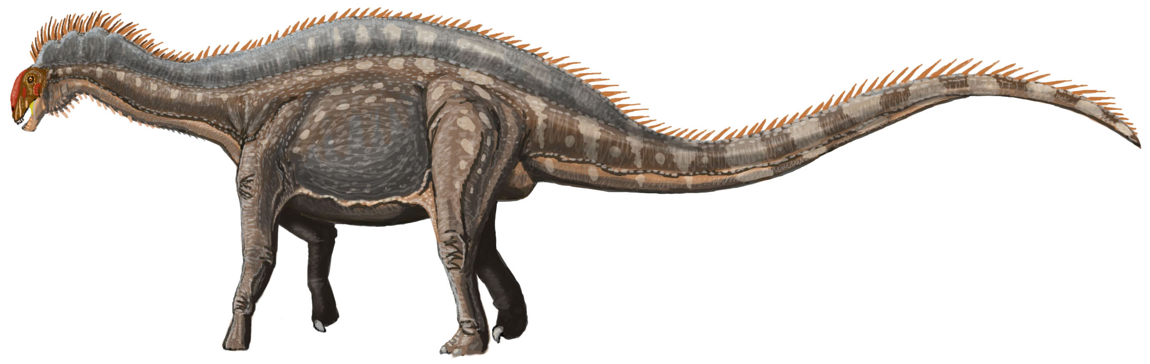 Dicraeosaurus hansemanni